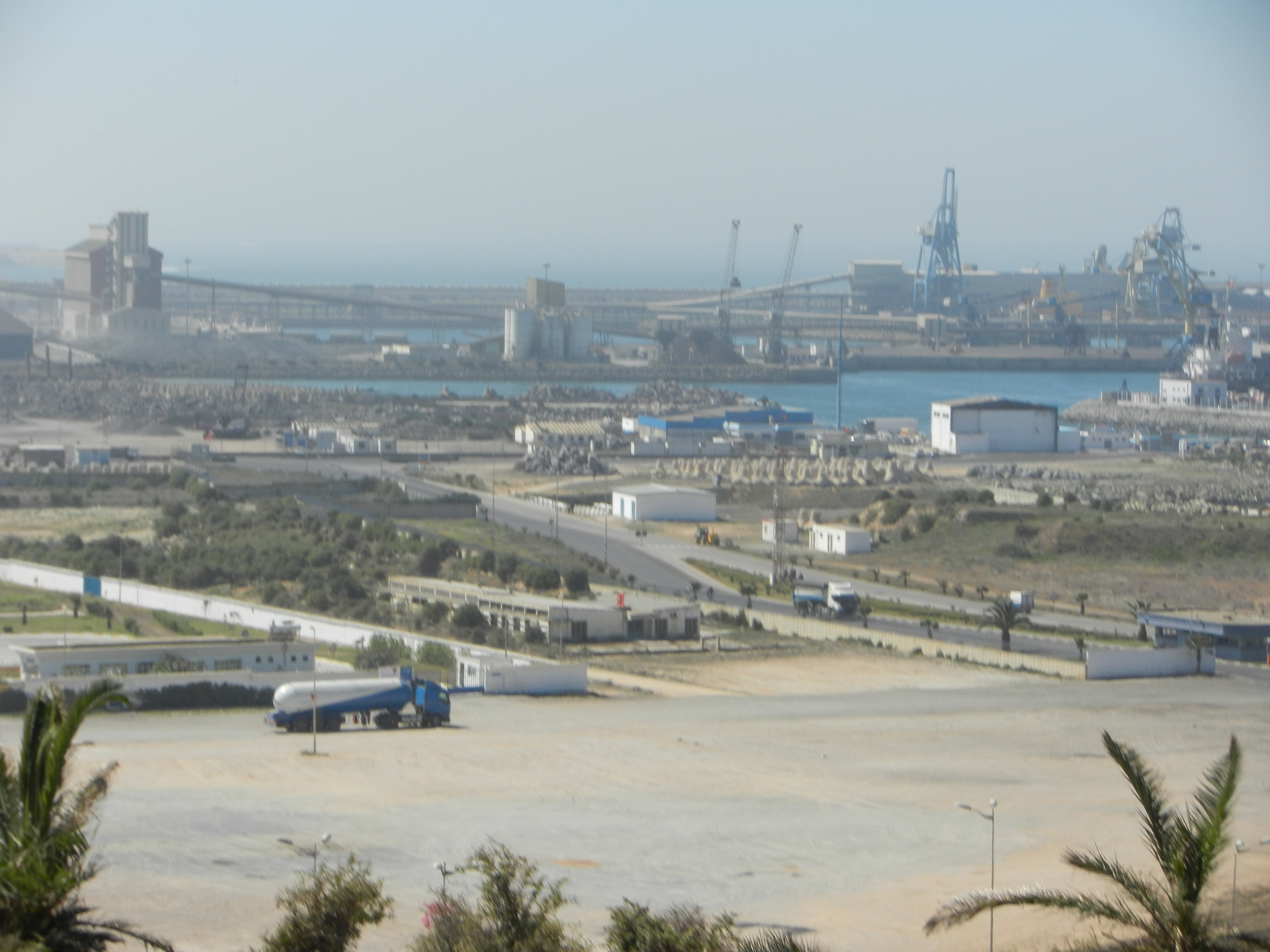 site portuaire et industriel